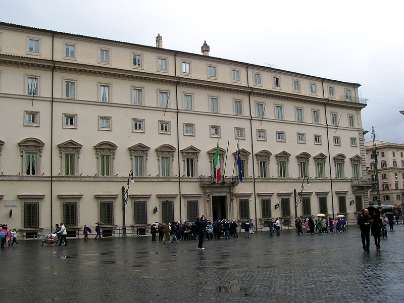 Roma - Palazzo Chigi